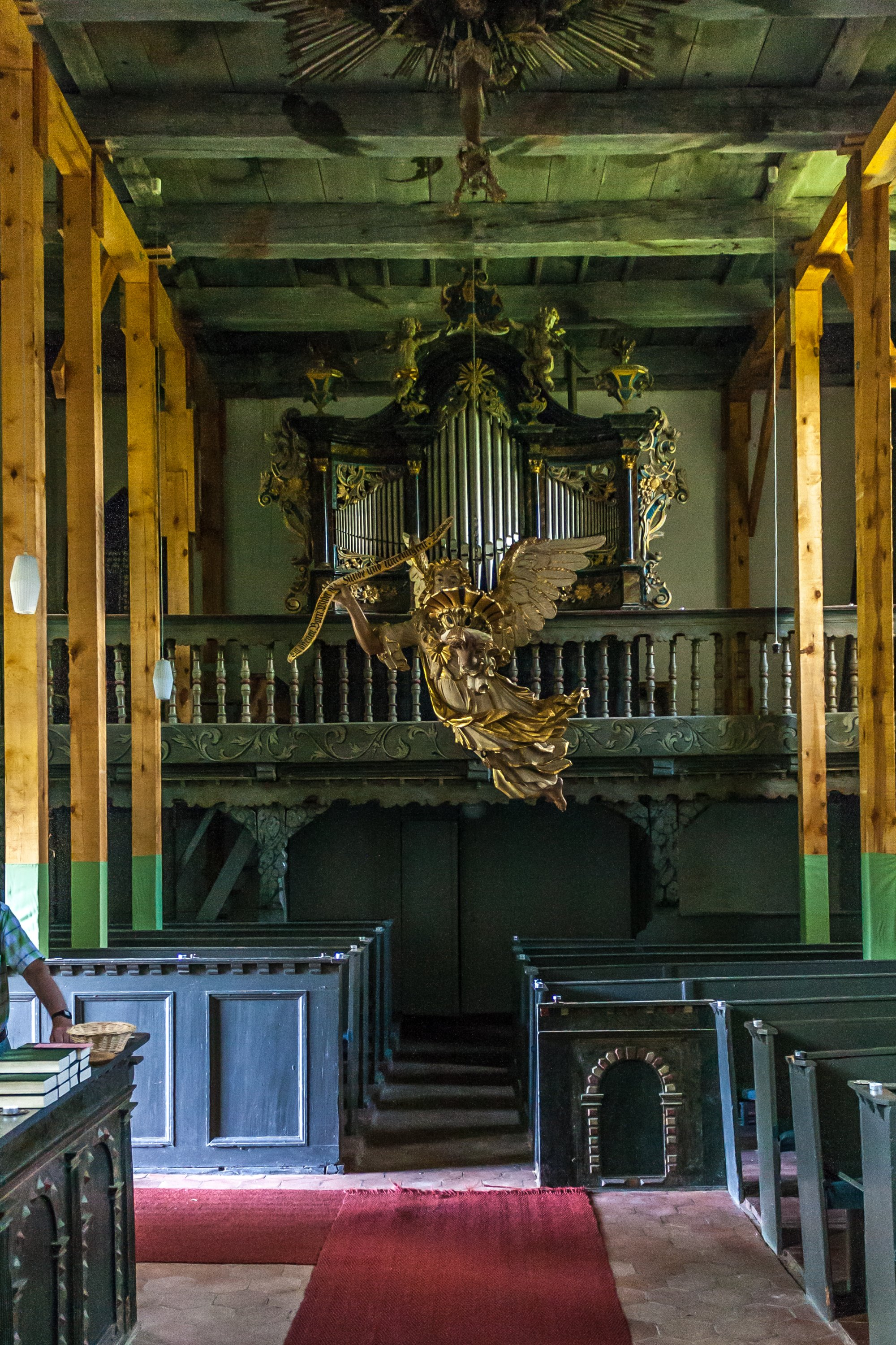 Dorfkirche Felchow Taufengel